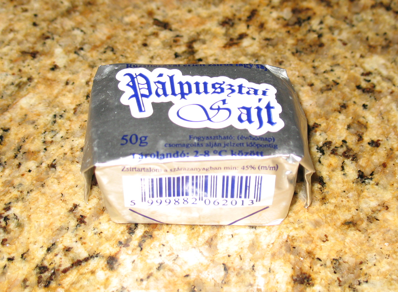 Hungarian Palpusztai cheese wrapped